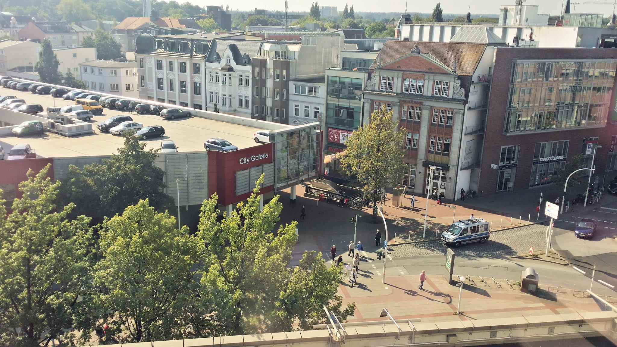 Fotografie der Lüneburger Straße und der City Galerie aus den oberen Stockwerken des Karstadt-Gebäudes